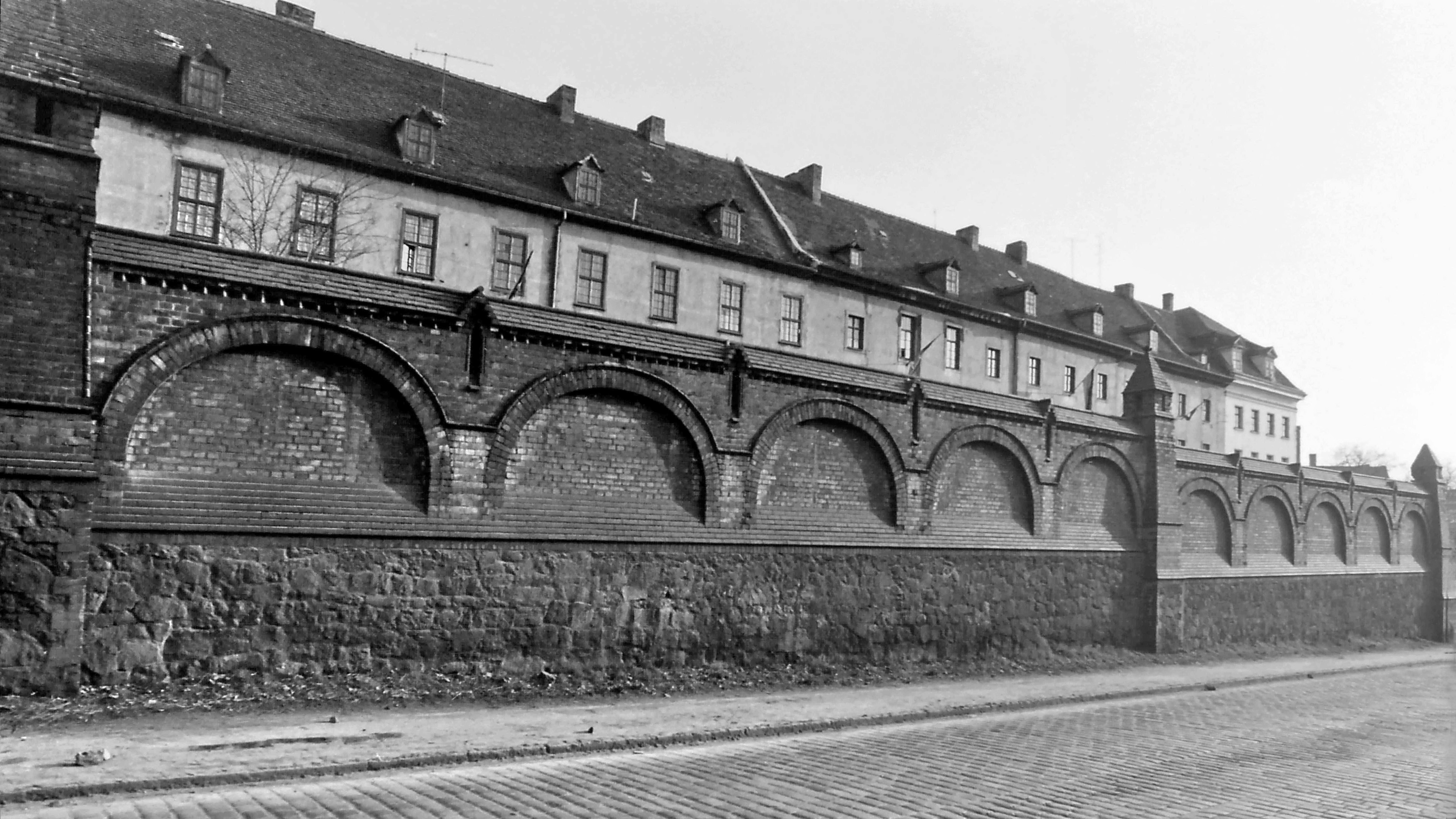 Historische Waisenhausmauer der Franckeschen Stiftungen in Halle